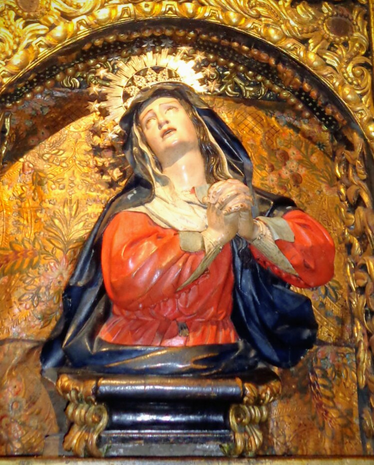 Dolorosa, por Tomás de la Sierra (1692)